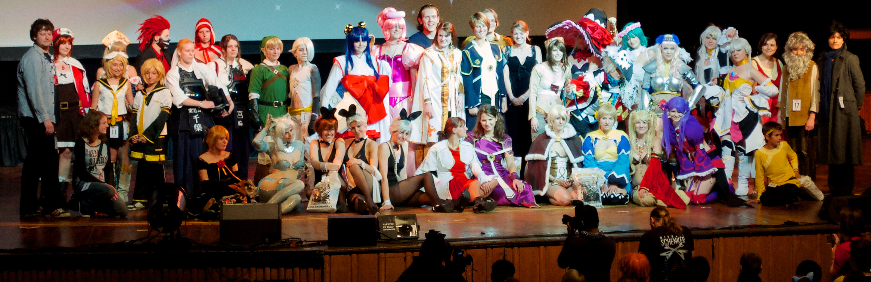 Gruppenfoto aller Teilnehmer des Cosplay-Wettbewerbs der AnimagiC 2012